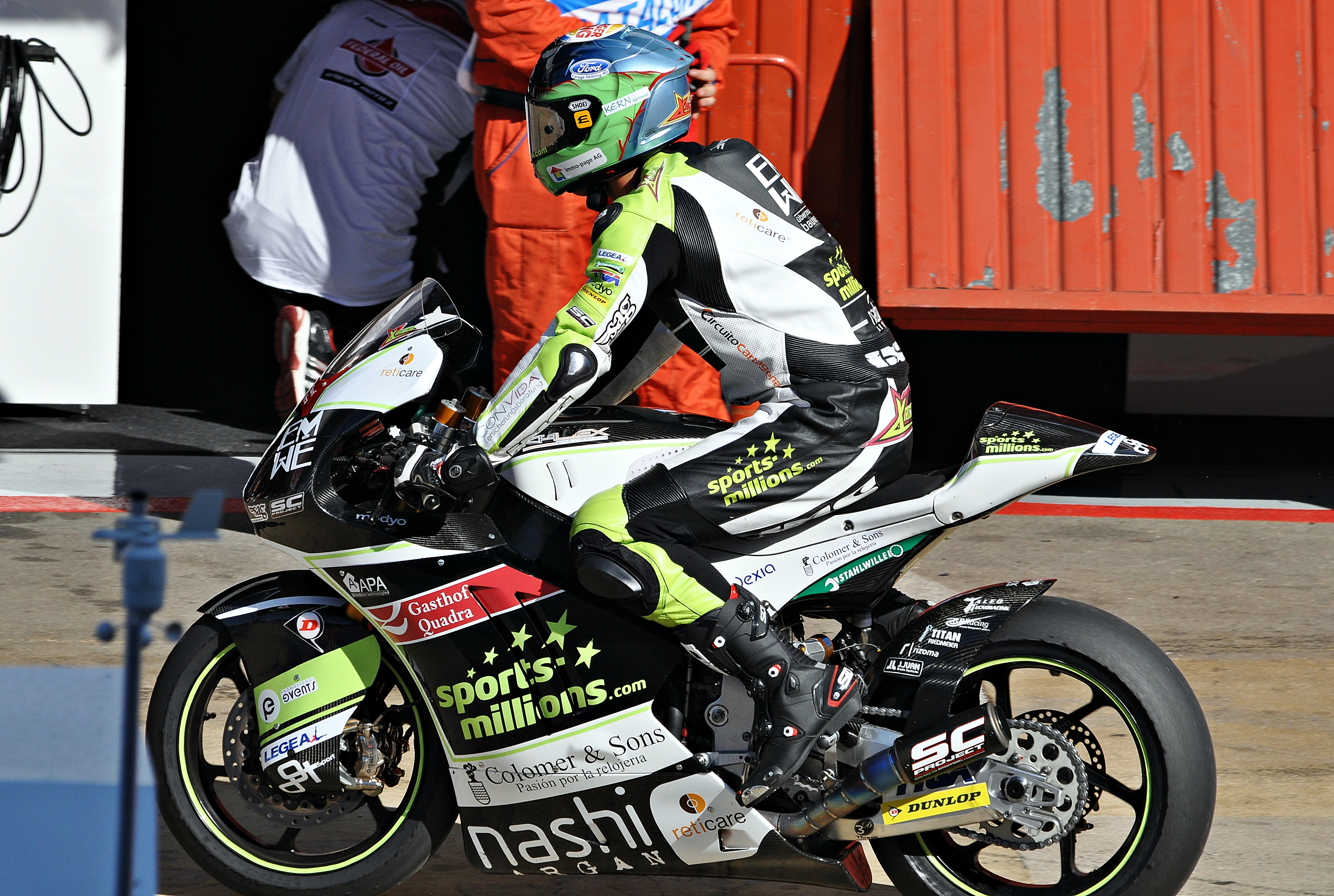 gran premio de cataluña